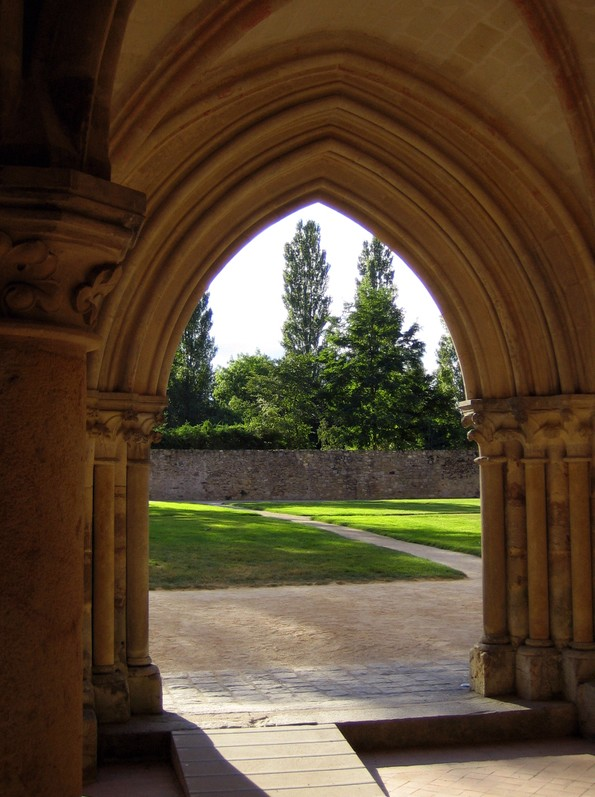 Entrée de la salle Capitulaire de l'Abbaye de l'Épau.